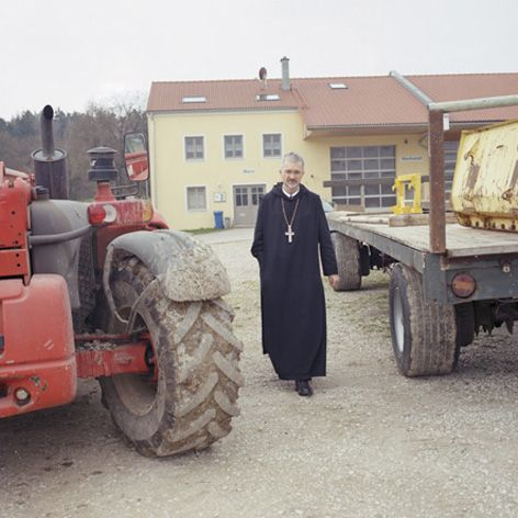 Der Abt Gregor Maria Hanke im Kloster Plankstetten3=de mit landwirtschaftlichen Produktionsmitteln. Arbeit aus dem Projekt: 24 Stunden im Leben der katholischen Kirche (2005). Bilder des 12.04.2005 Heyne, ISBN 3-453-12032-9